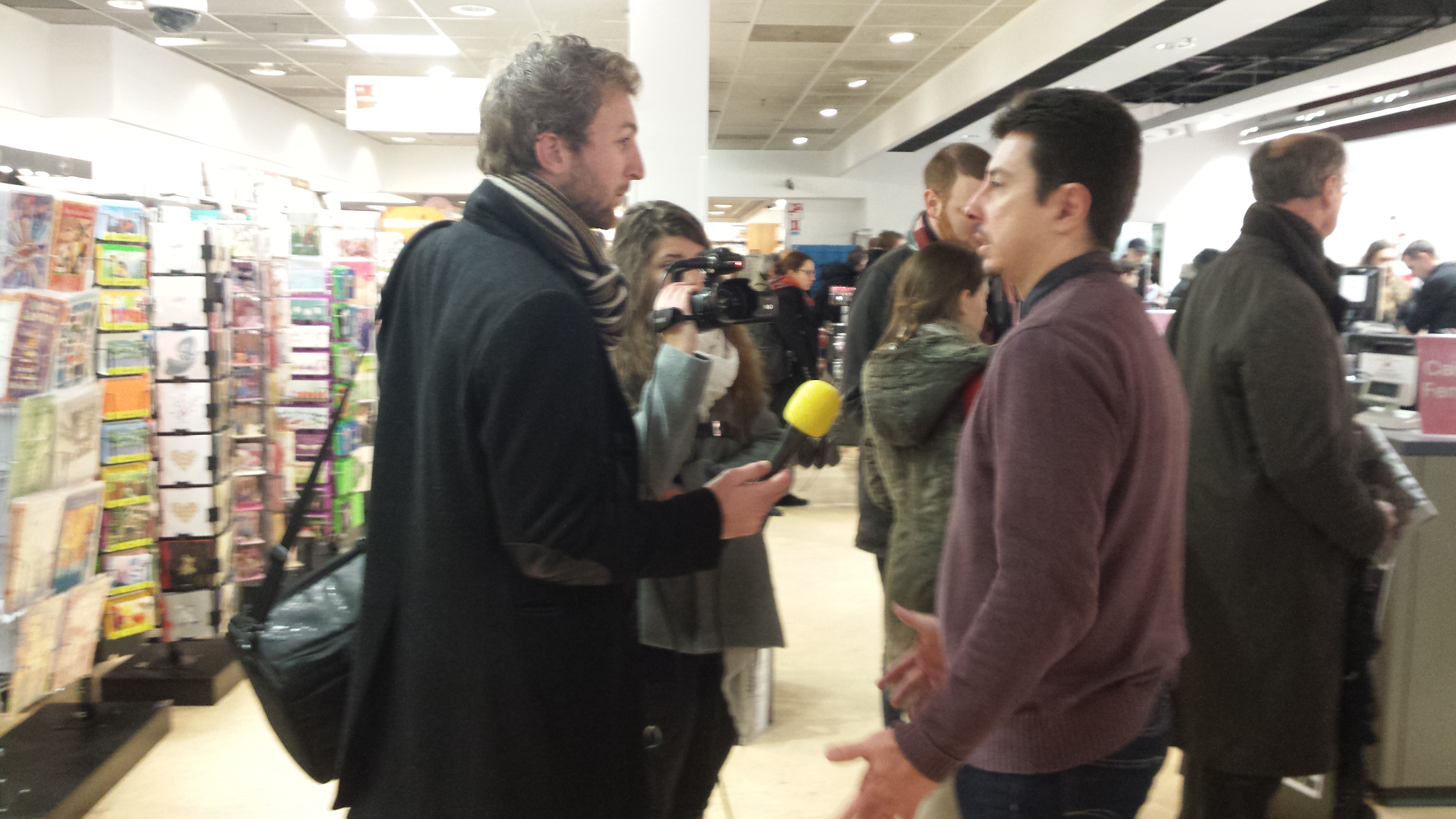 Journalistes interviewant un vendeur du Furet du Nord à Lille, le 14 janvier 2015, jour de la sortie du numéro 1178 de Charlie Hebdo ("numéro des survivants").